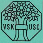 Verband schweizerischer Konsumvereine (V.S.K.), Schweiz